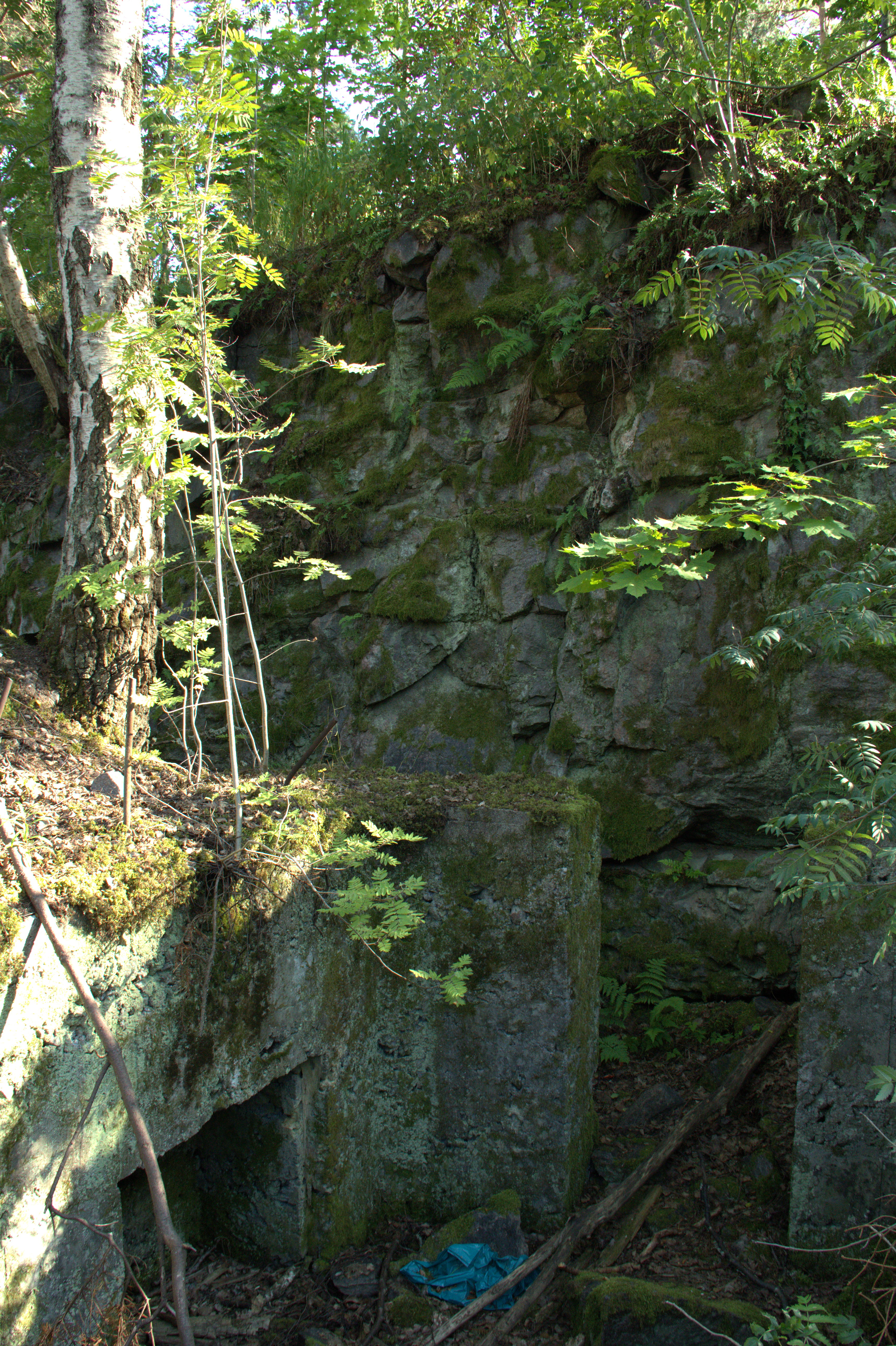 Osa ensimmäisen maailmansodan aikaista puolustusrakennelma Vartiokylän linnavuorella